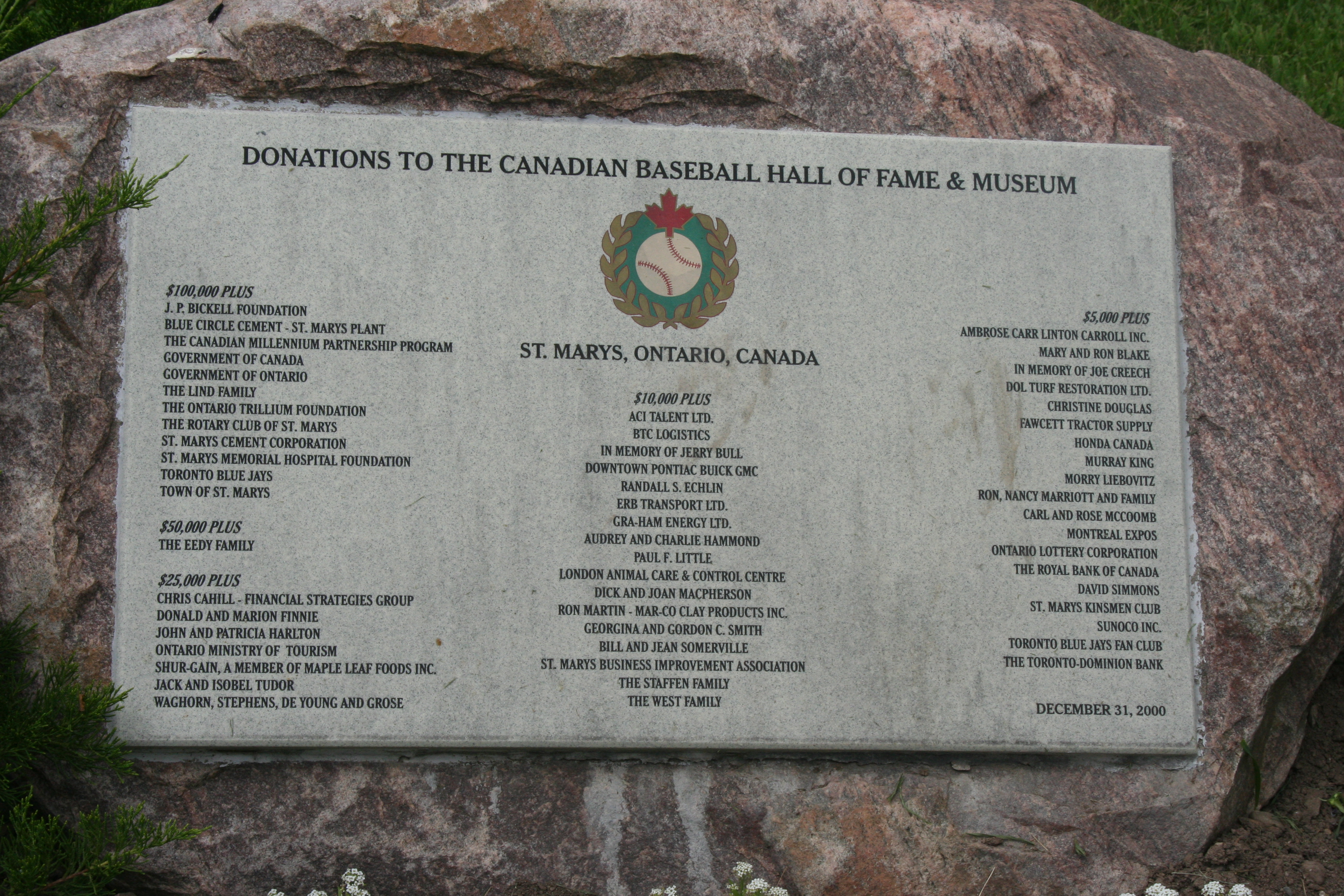 石碑に刻まれたカナダ野球博物館への寄付金額と寄付団体名簿